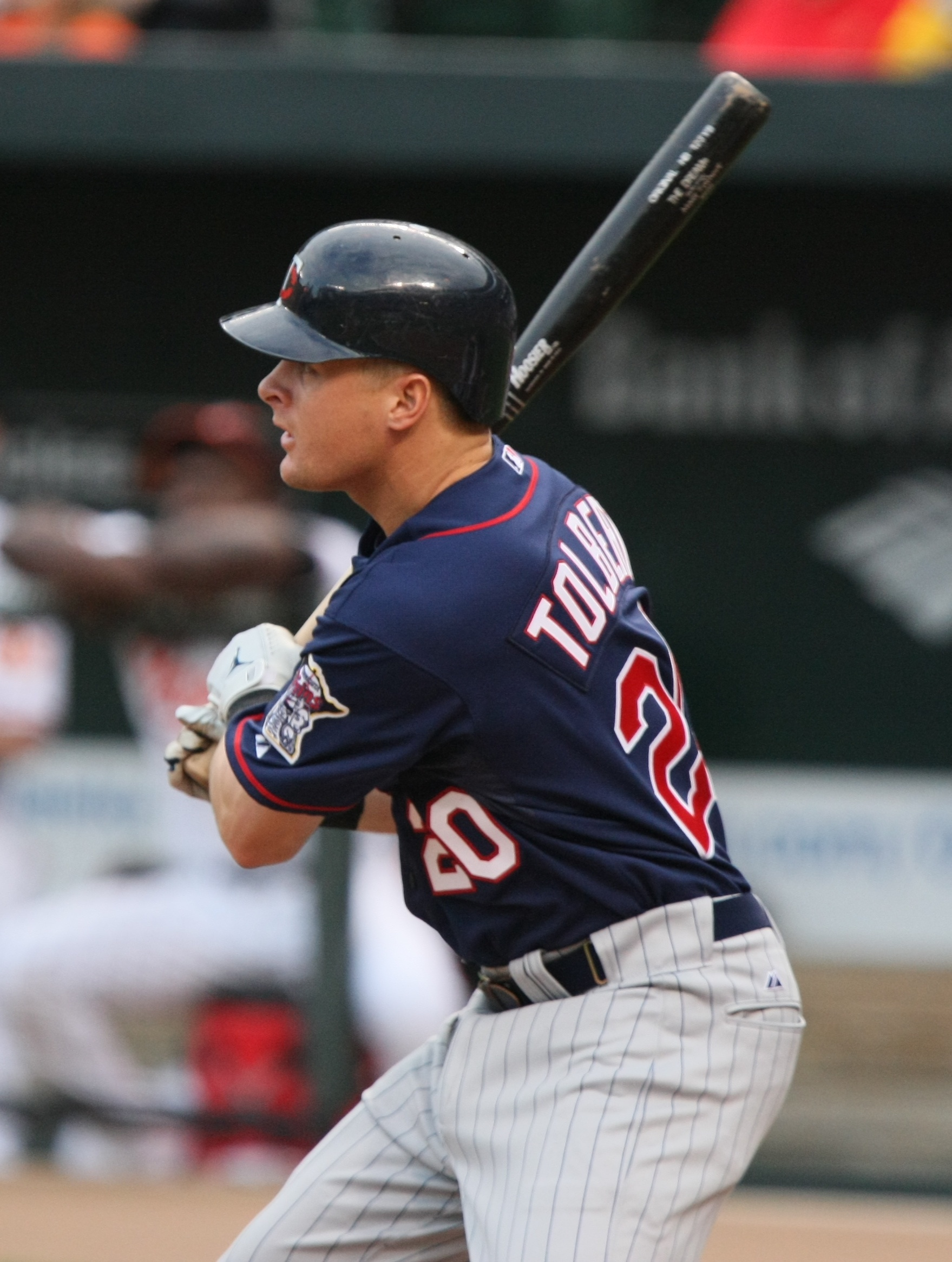 Matt Tolbert